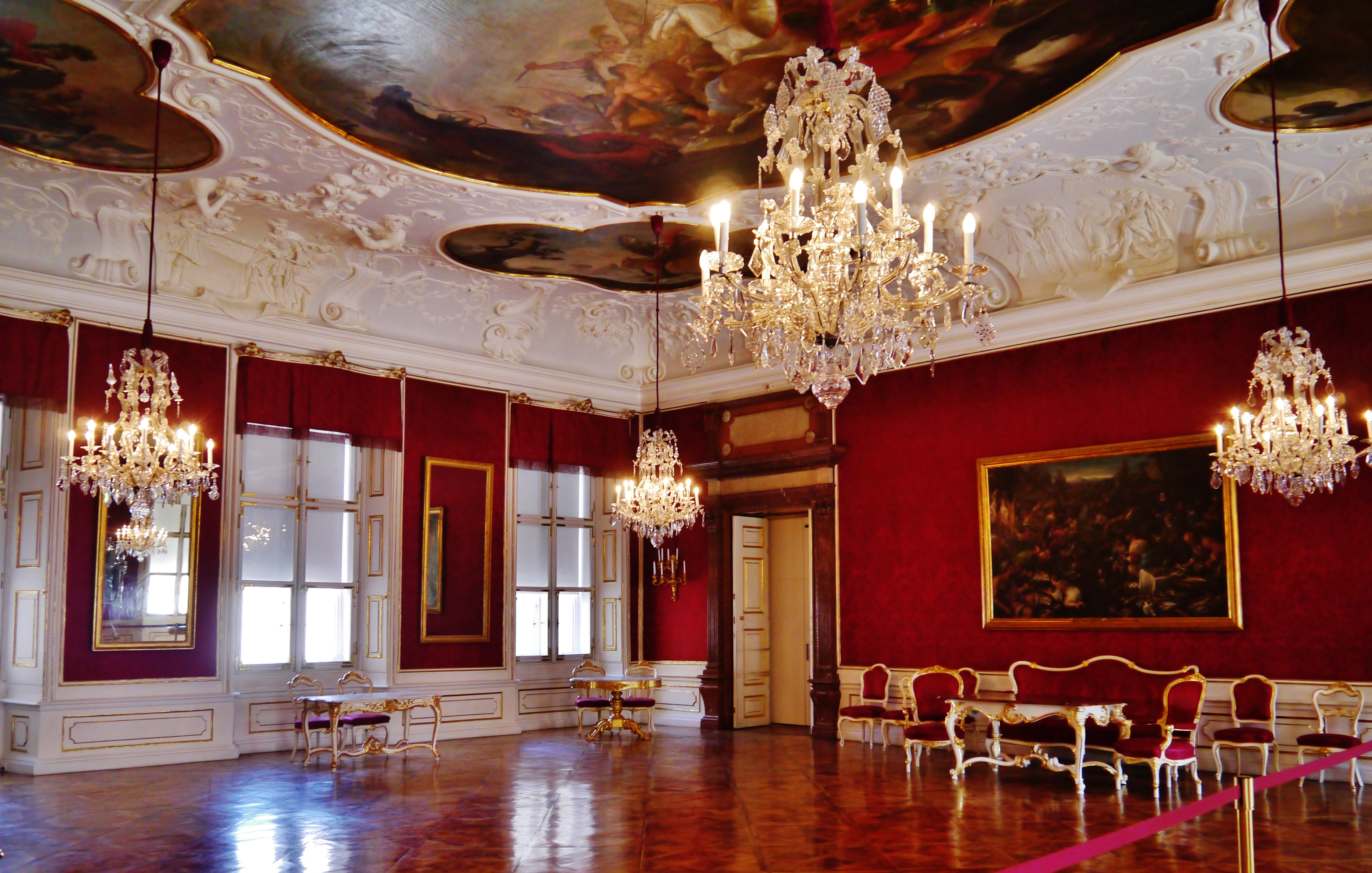 Innenräume der Residenz, Salzburg, Salzburg, Österreichen